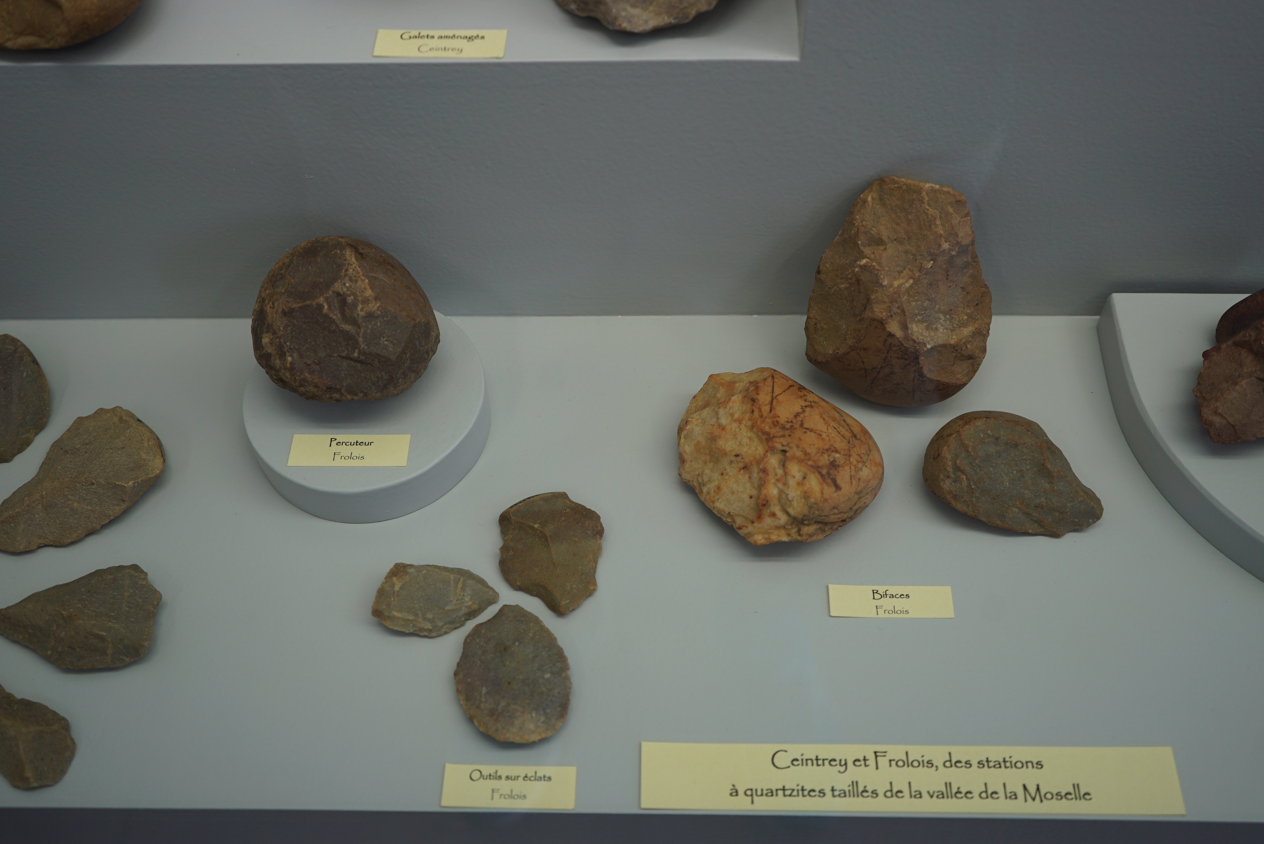 objets du paléolithique au musée de Toul.